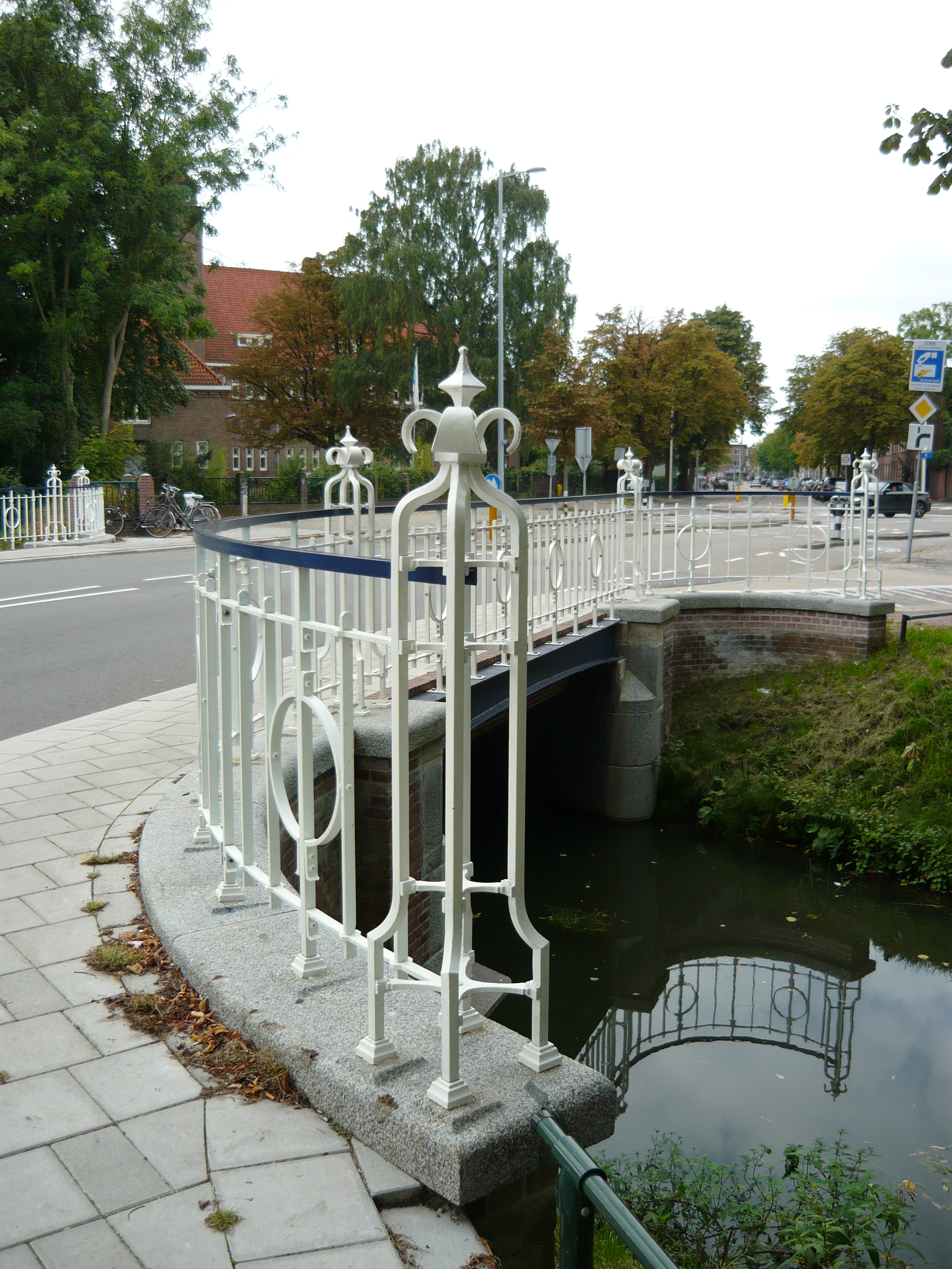 De Julianabrug, een monumentale brug in de Nederlandse stad Utrecht over de Minstroom, detail